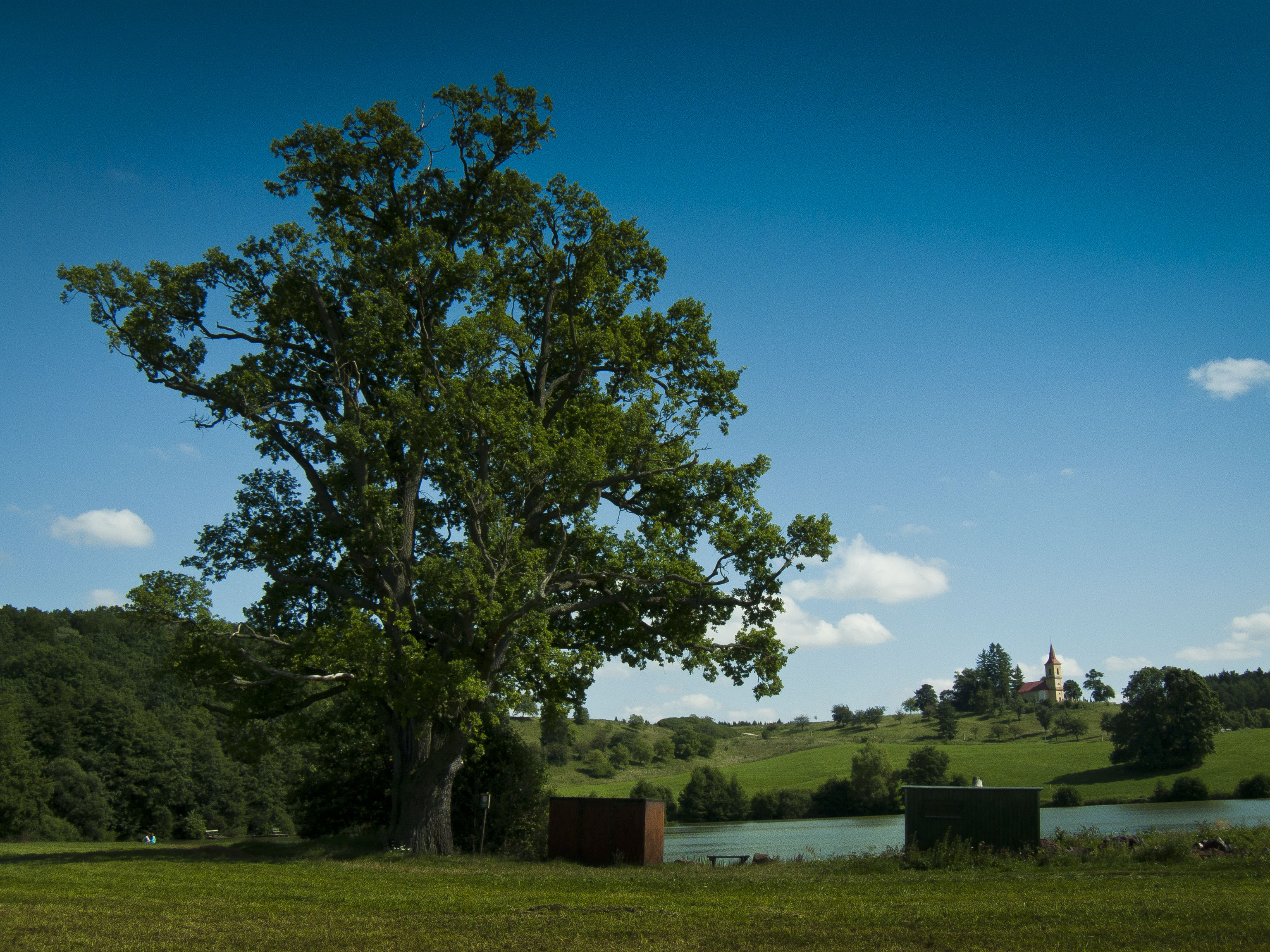 Erbenův dub u zaniklé obce Byšičky. V pozadí kostel svatého Petra a Pavla.